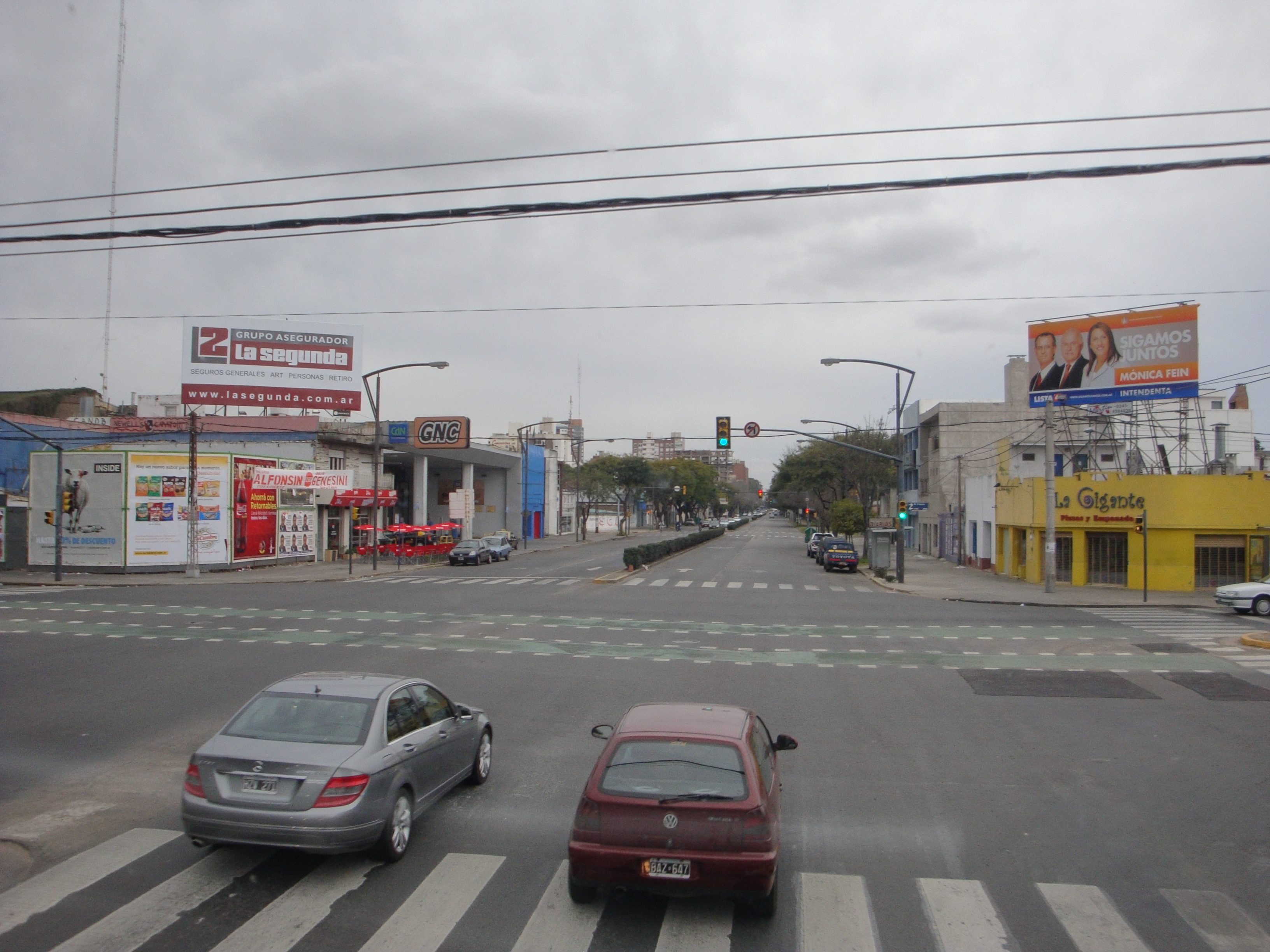 Intersección de la Avenida Pellegrini con la Avenida Francia, Rosario, Argentina.